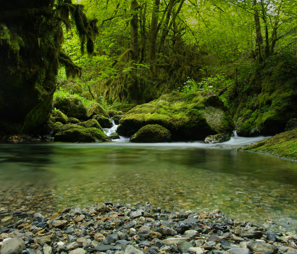 La rivière Arros, dans sa partie amont, encaissé dans un vallon très humide.